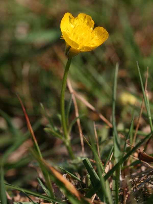 Knolliger Hahnenfuß (Ranunculus bulbosus)